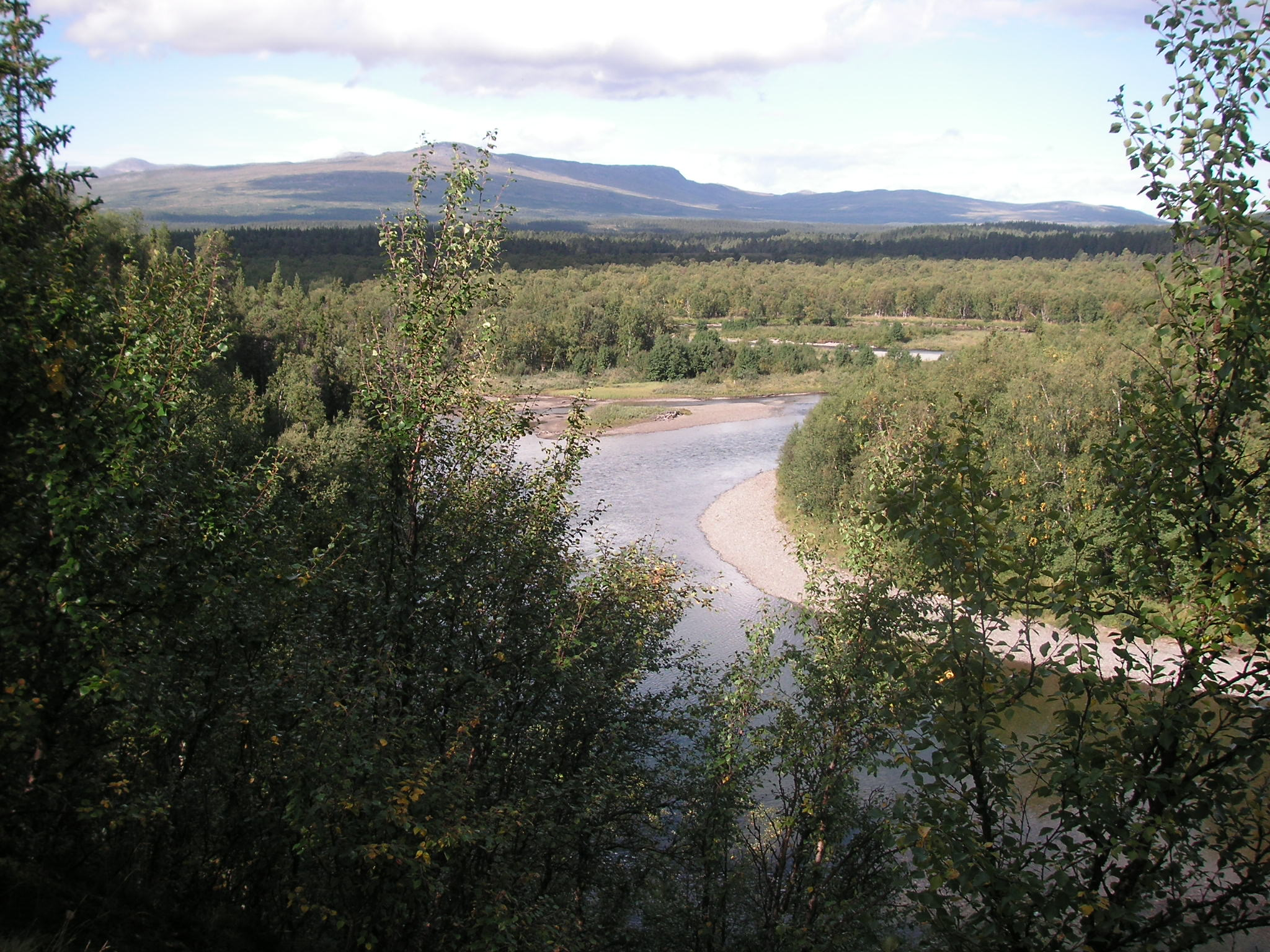 Vålådalen